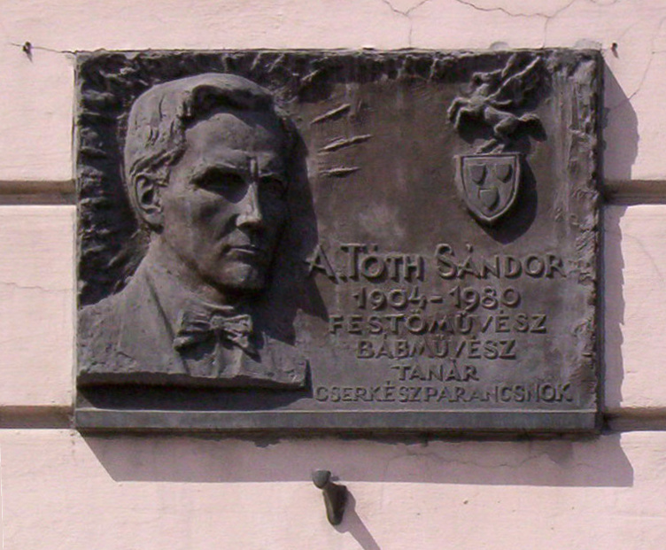 Memorial tablet of Sándor A. Tóth on the Pápa Reformed Grammar School's wall. Art by Barna Buza, inaugurated on 3 September 1991. Inscription: "Sándor A. Tóth, 1904-1980, painter, puppeteer, teacher, scoutmaster." A. Tóth Sándor emléktáblája a Pápai Református Gimnázium falán. Buza Barna munkája, 1991. szeptember 3-án avatták fel.